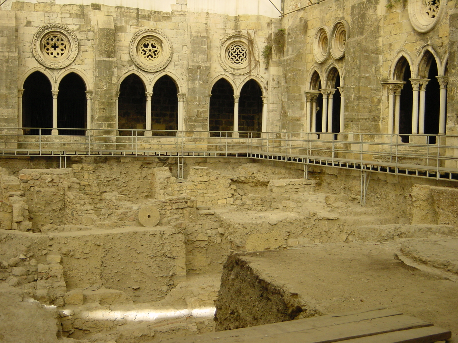 Claustros da Sé de Lisboa